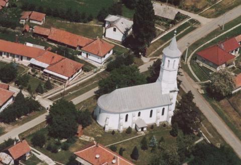 Szamossályi, Hungary, aerialphotography